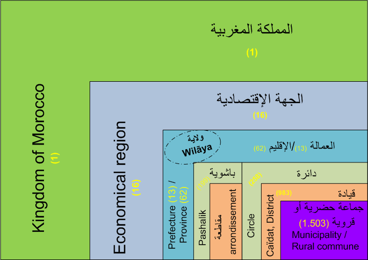 Division Administrative Marocaine